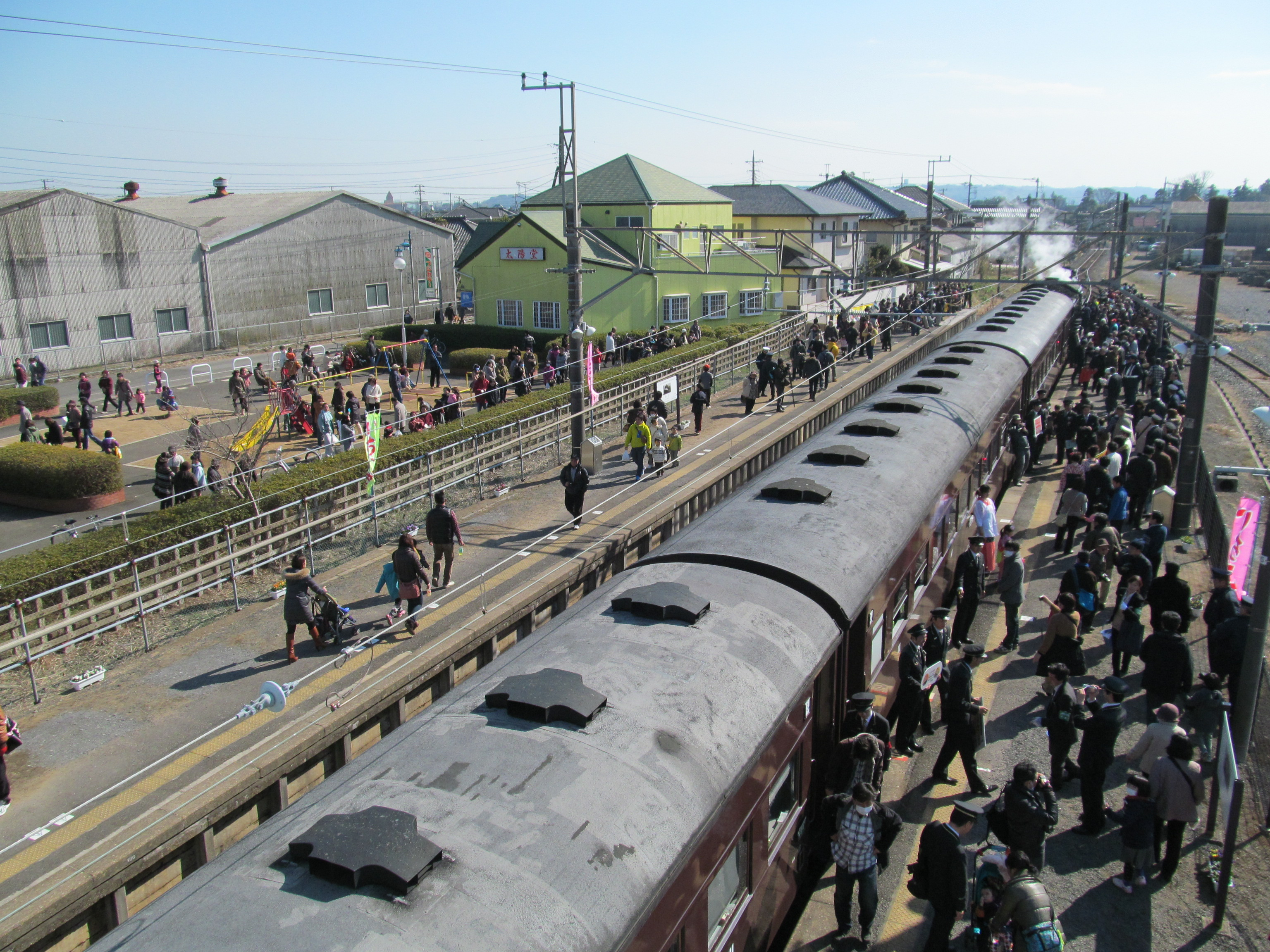 成田線・笹川駅に停車中のDLおいでよ佐原号。手前から、オハ47 2261、同2246、オハニ36 11、C61 20。